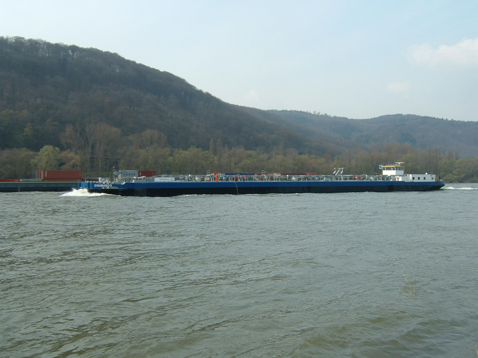 Gastanker